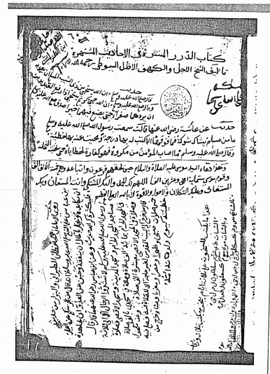 صورة غلاف كتاب الدرر المنتثرة في الأحاديث المشتهرة